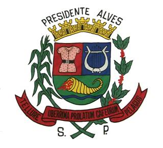 Brasão de Presidente ALves, São Paulo, Brasil